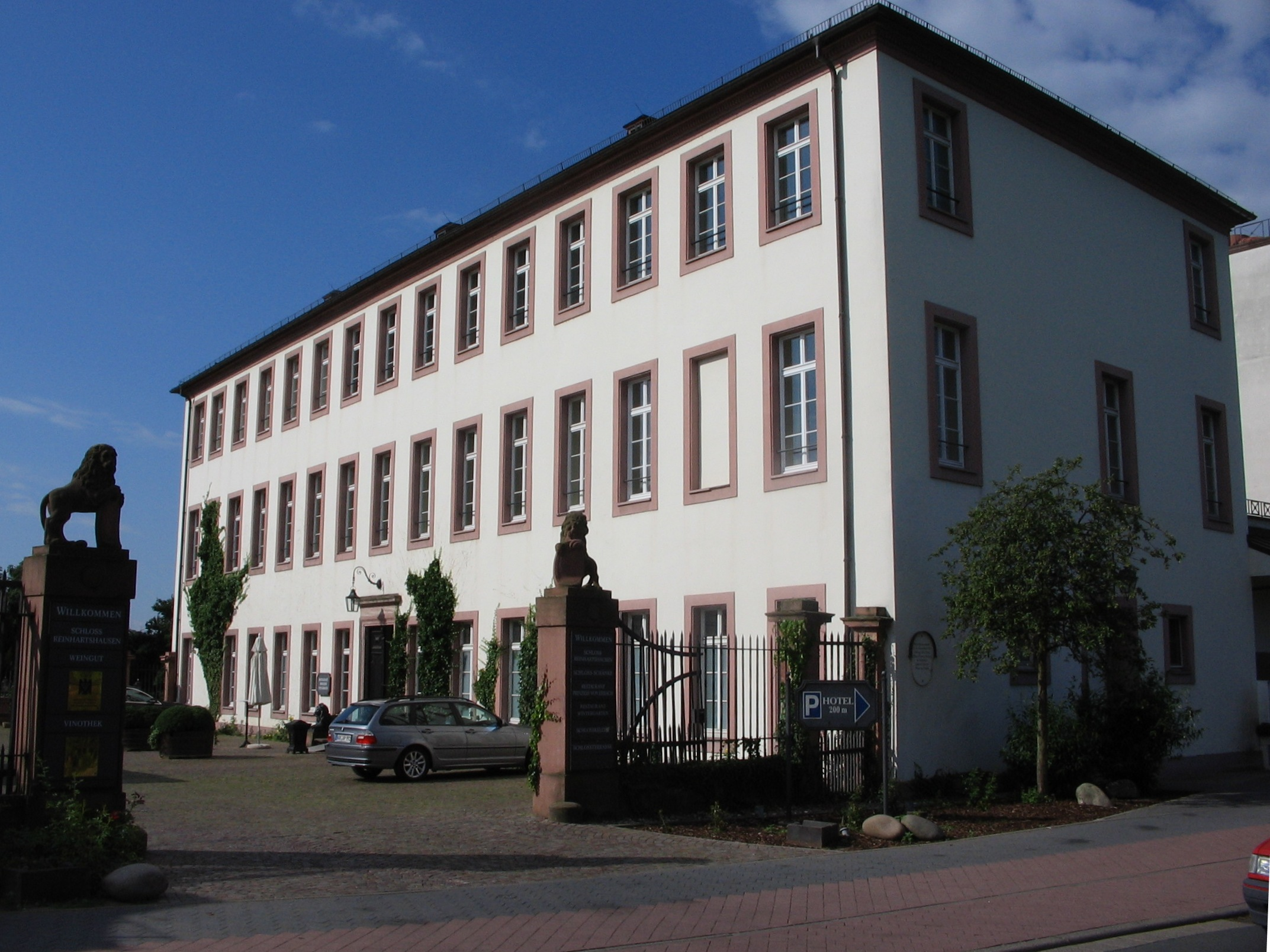 Blick von der Hauptstraße in Erbach im Rheingau durch das Schlosstor auf die Ostfassade von Schloss Reinhartshausen am Schlosshof.